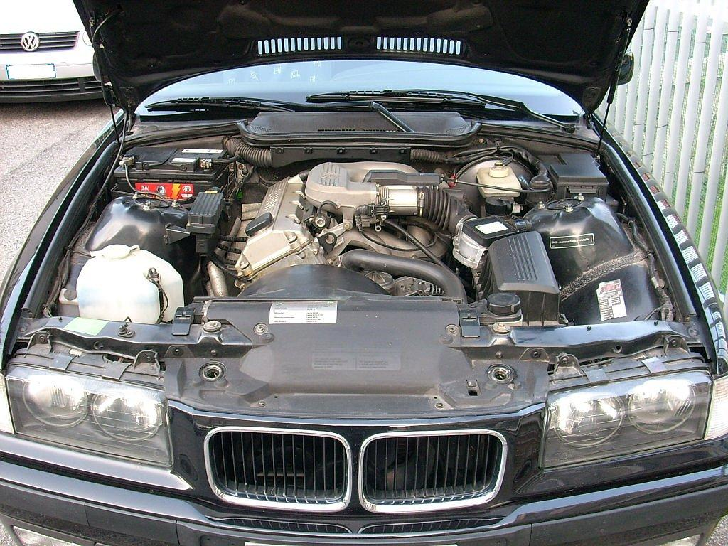 vista frontale del vano motore di un BMW E36 316 Coupe del 97